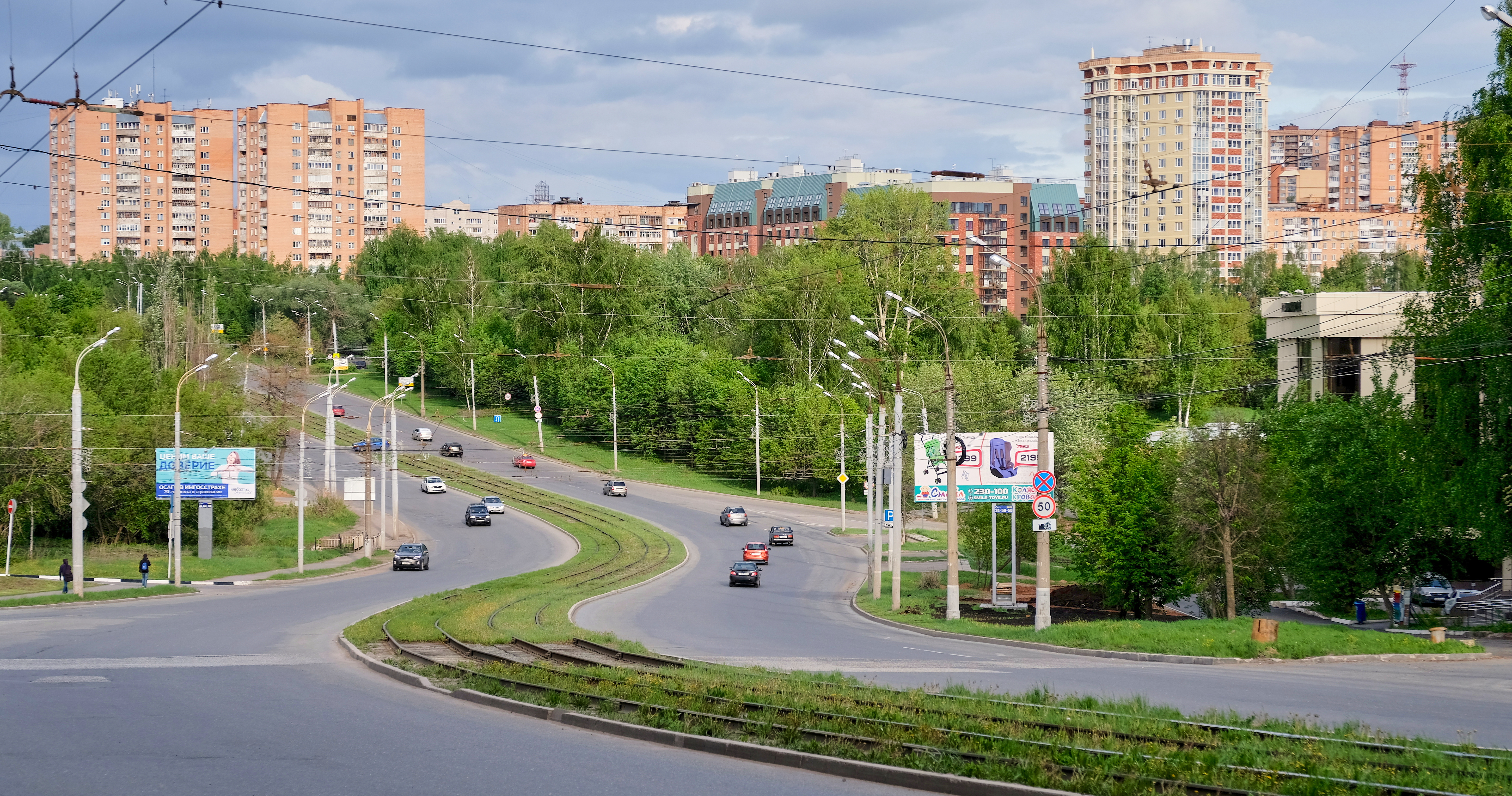 Улица Кирова в Ижевске (участок между улицами Горького и 30 лет Победы)